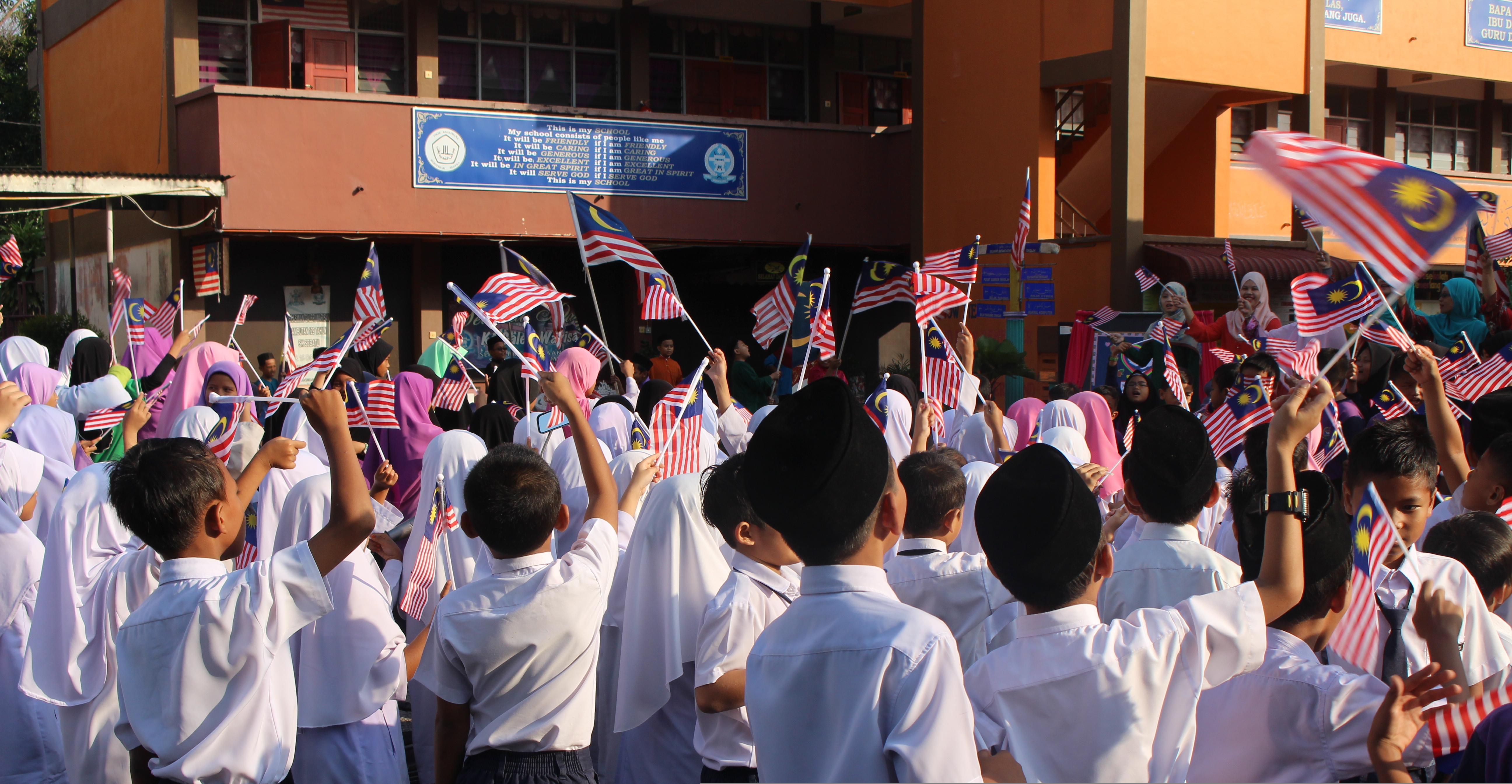 Kibaran Jalur Gemilang Oleh Murid-Murid